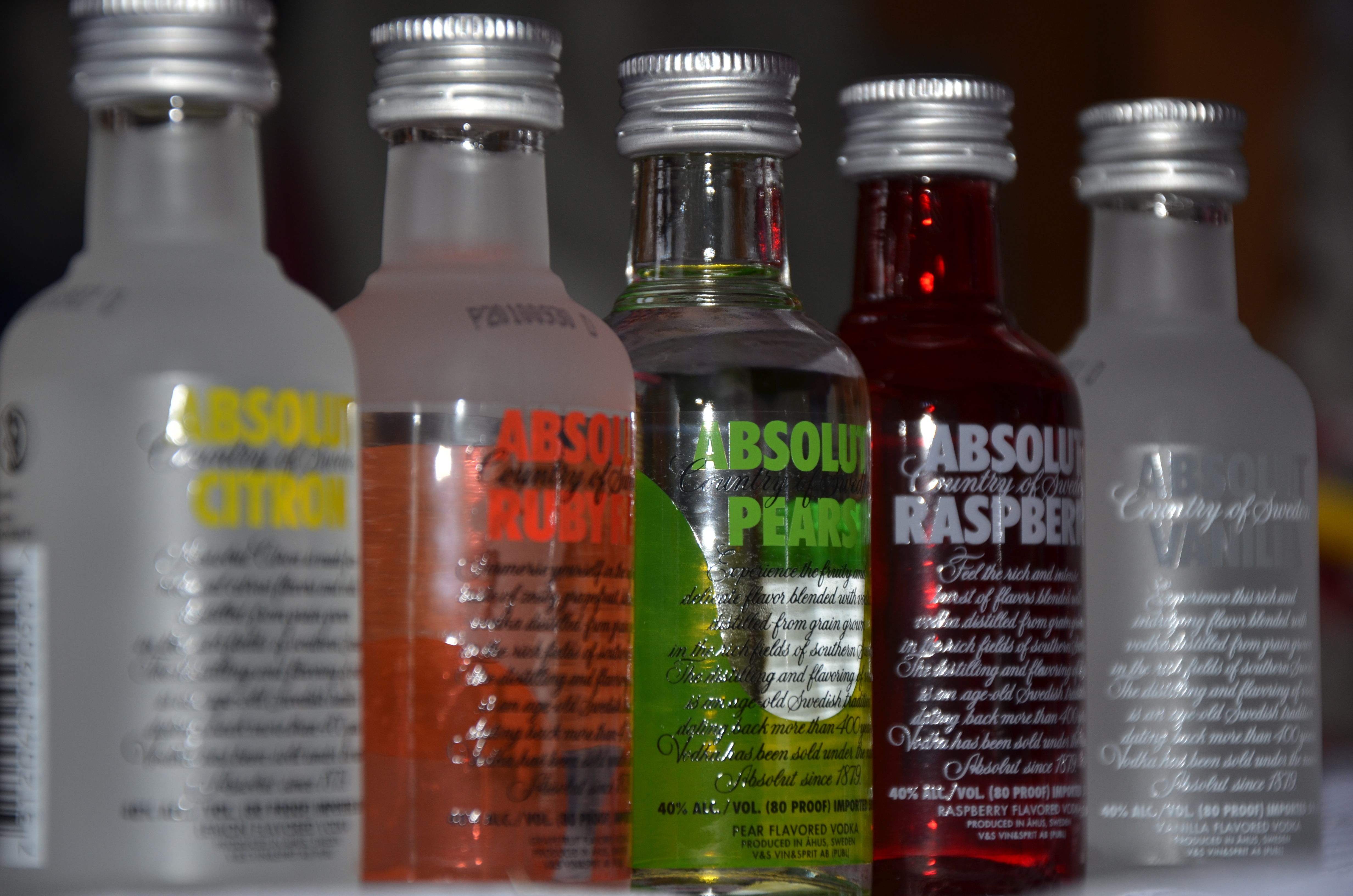 Absolut Vodka bottles